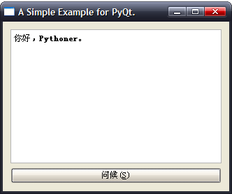 PyQt示例程序的截图